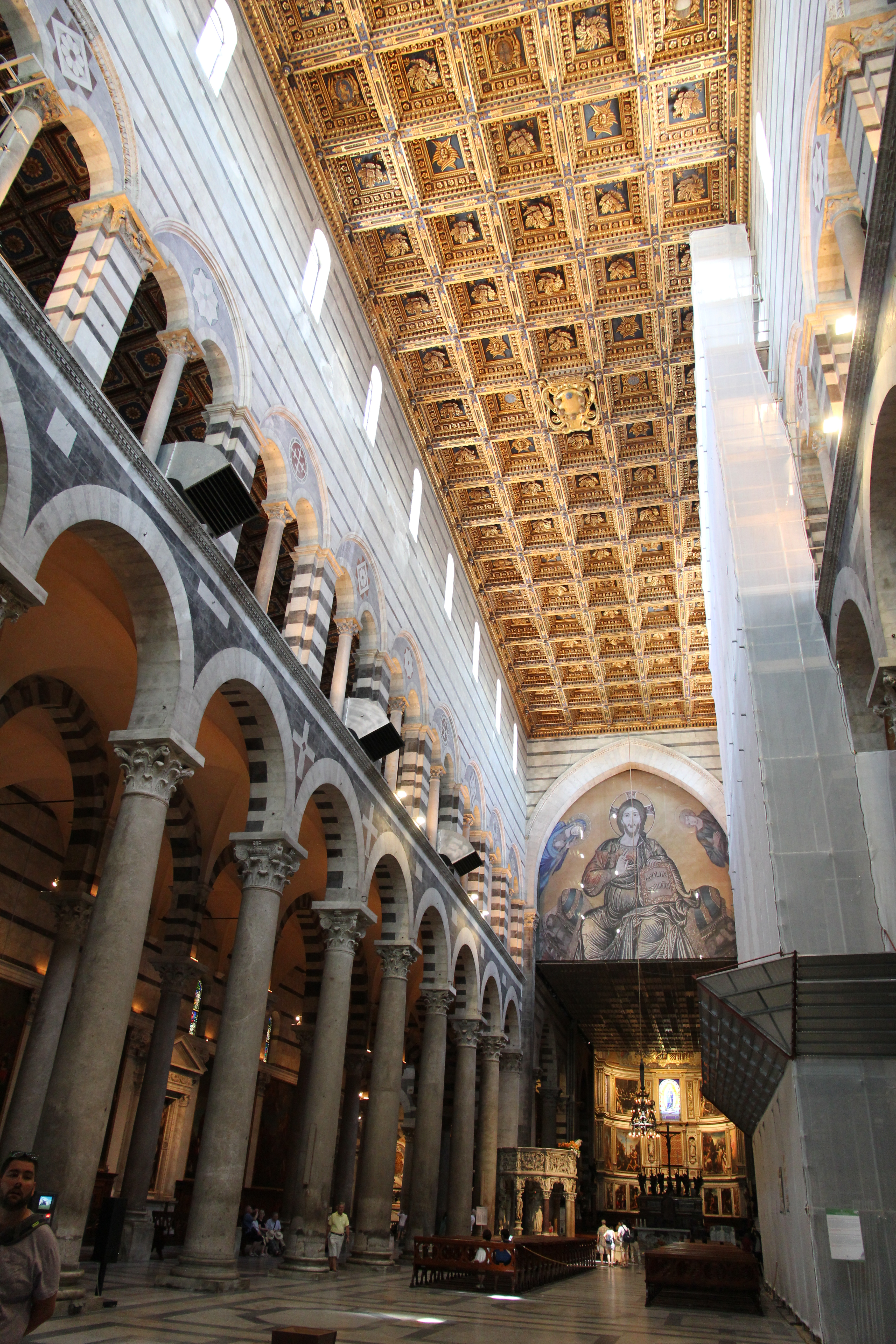 Pisa, cattedrale di Santa Maria Assunta